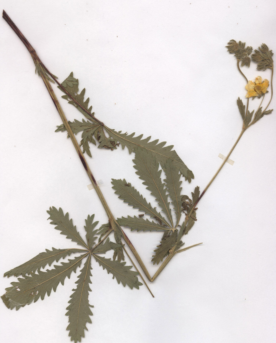 Potentilla recta ssp obscura, eigener Herbarbeleg von 1987, Unterfranken